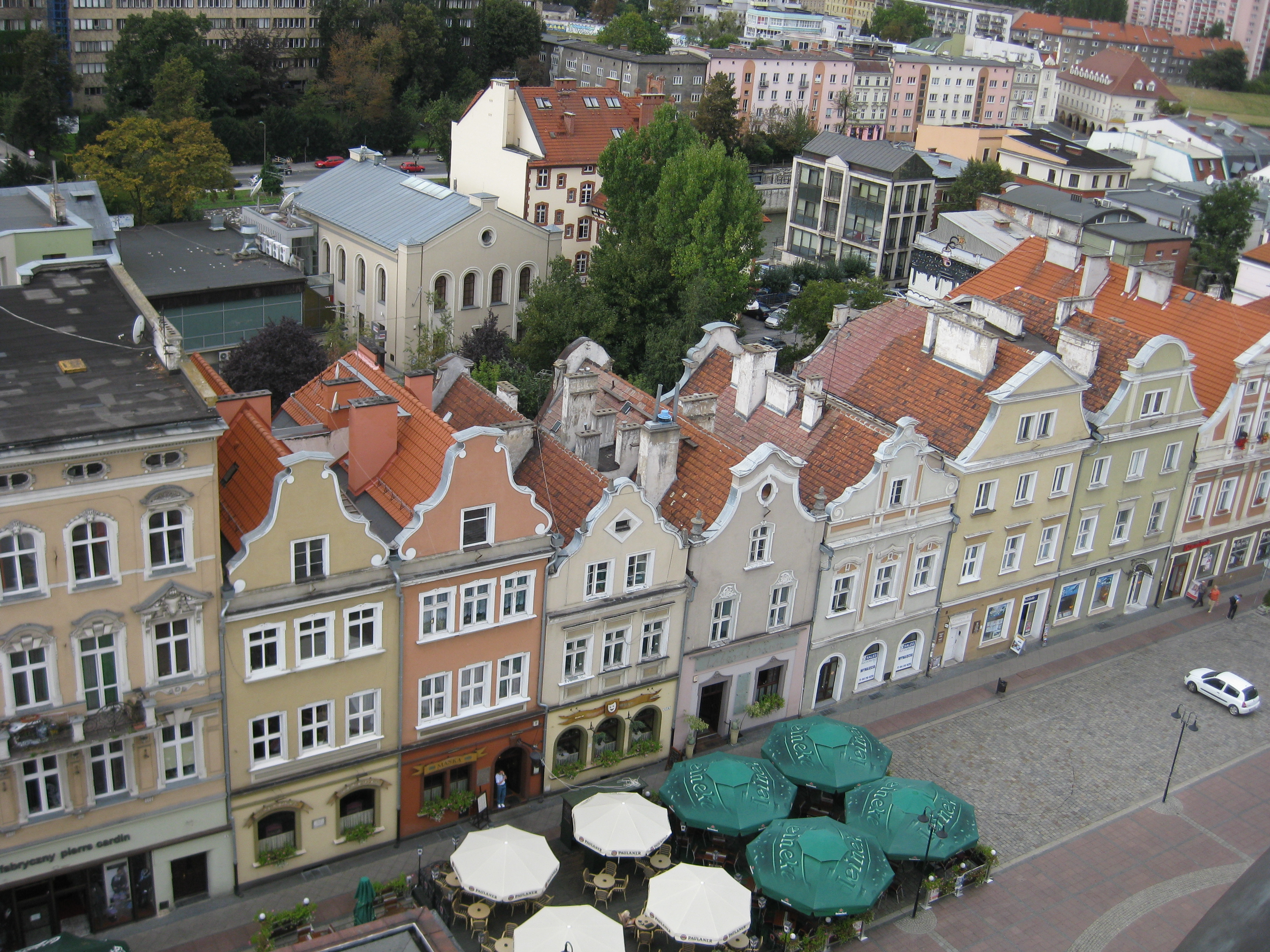 ring vom Rathaus gesehen